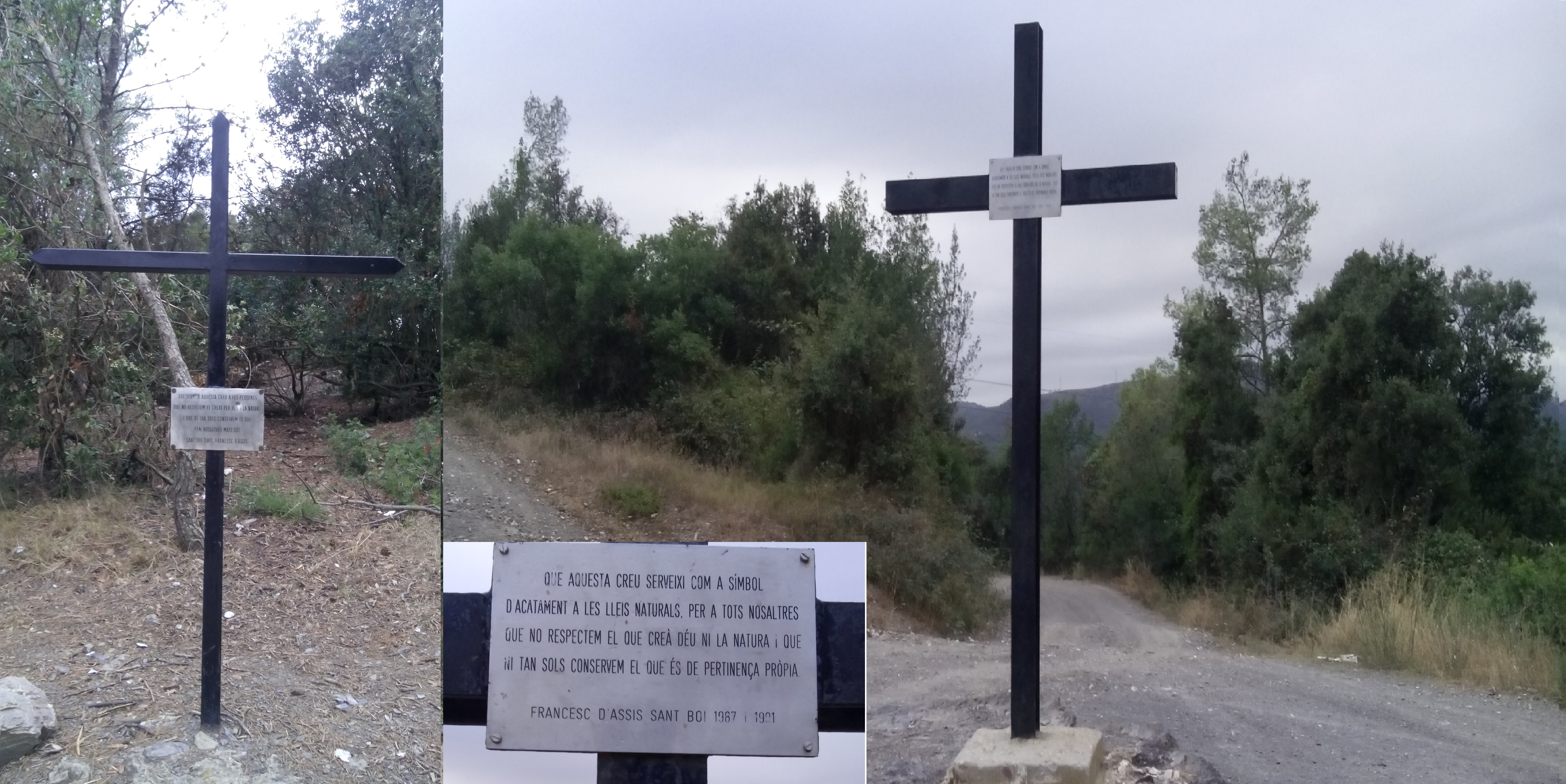 Creu de terme del Querol. Creu antiga i Creu nova i inscripció a la creu: "Que aquesta creu serveixi com a símbol d'acatament a les lleis naturals, per a tots nosaltres que no respectem el que creà Déu ni la natura i que ni tan sols conservem el que és de pertinença pròpia." Francesc d'Assís, Sant Boi 1987 i 1991